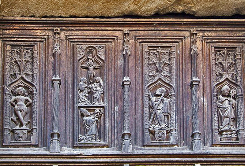 St-Thibault de Saint-Thibault, NordportalDetail Türflügel